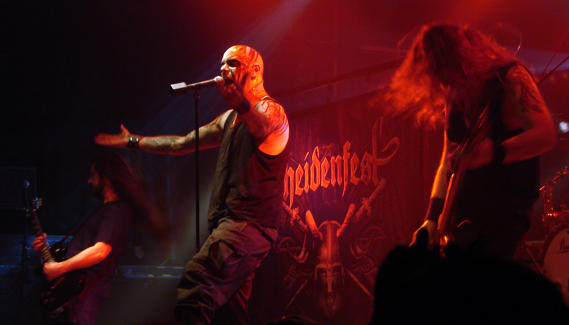 Primordial en concert à la Locomotive, à Paris, pendant le Heidenfest Tour 2008.